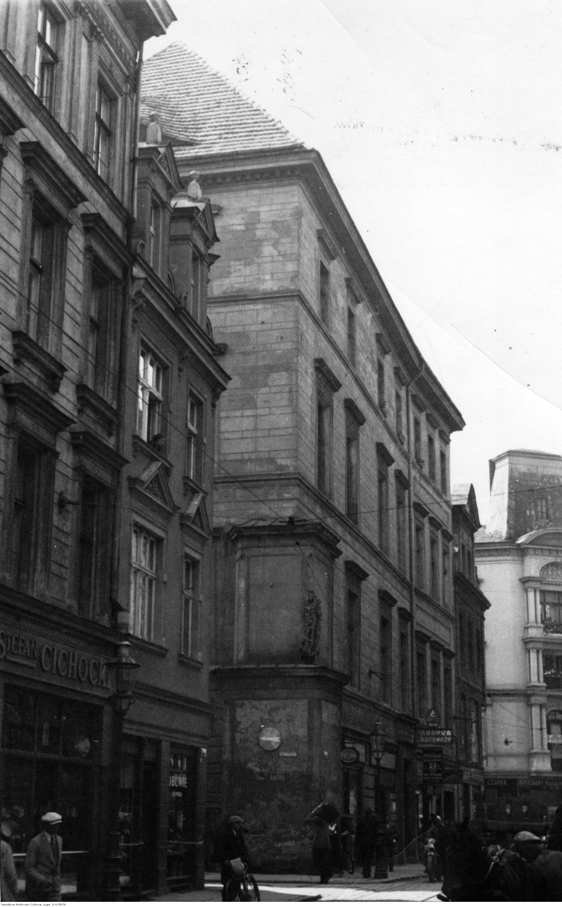 Pałac Górków od strony ulicy Klasztornej i Wodnej w Poznaniu, fotografia wykonana między 1925 a 1939